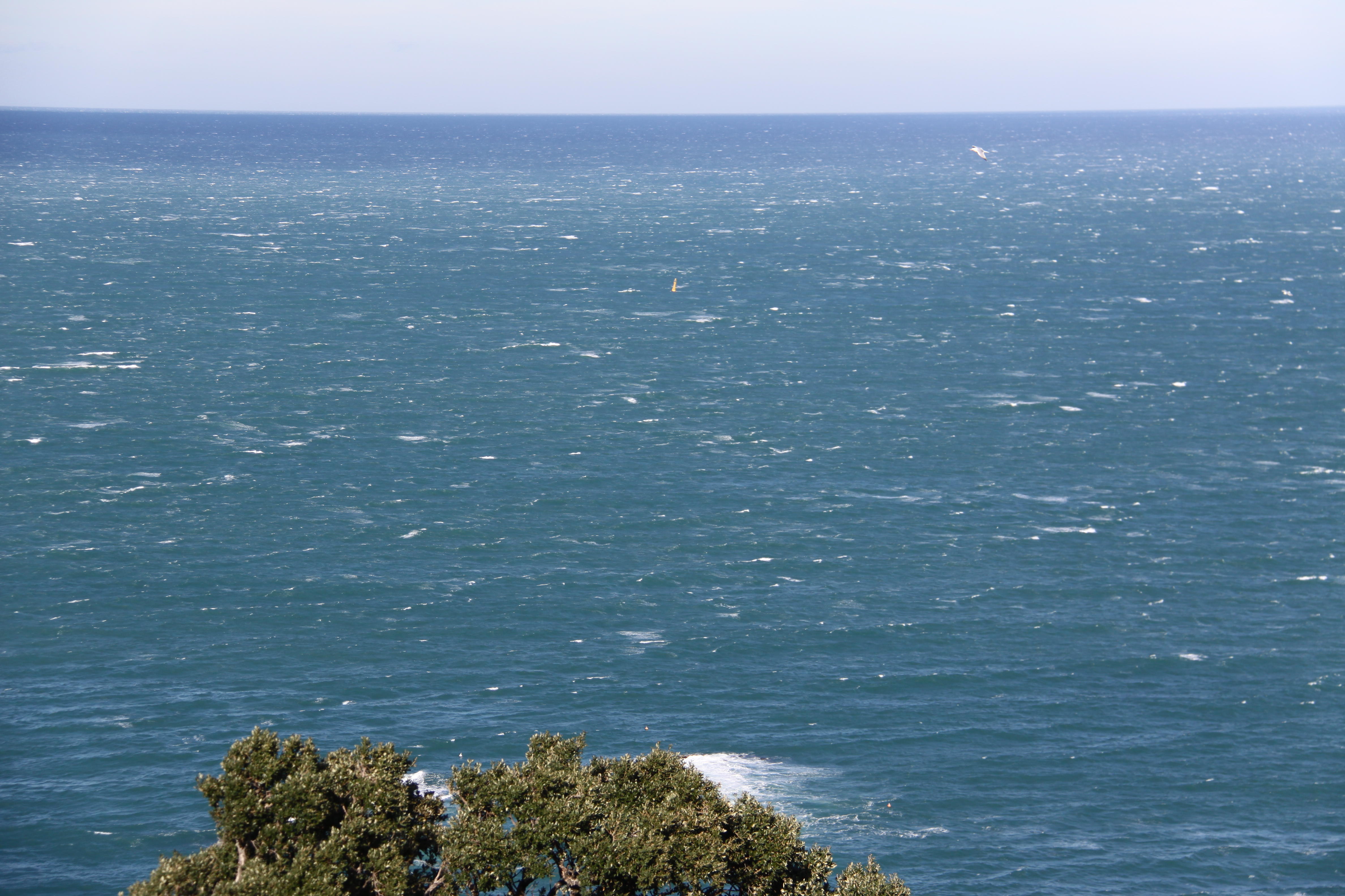 Une mer agitée par la Tramontane soufflant le long de la Côte Vermeille. Entre Banyuls-sur-Mer et Cerbère, Pyrénées-Orientales, France.